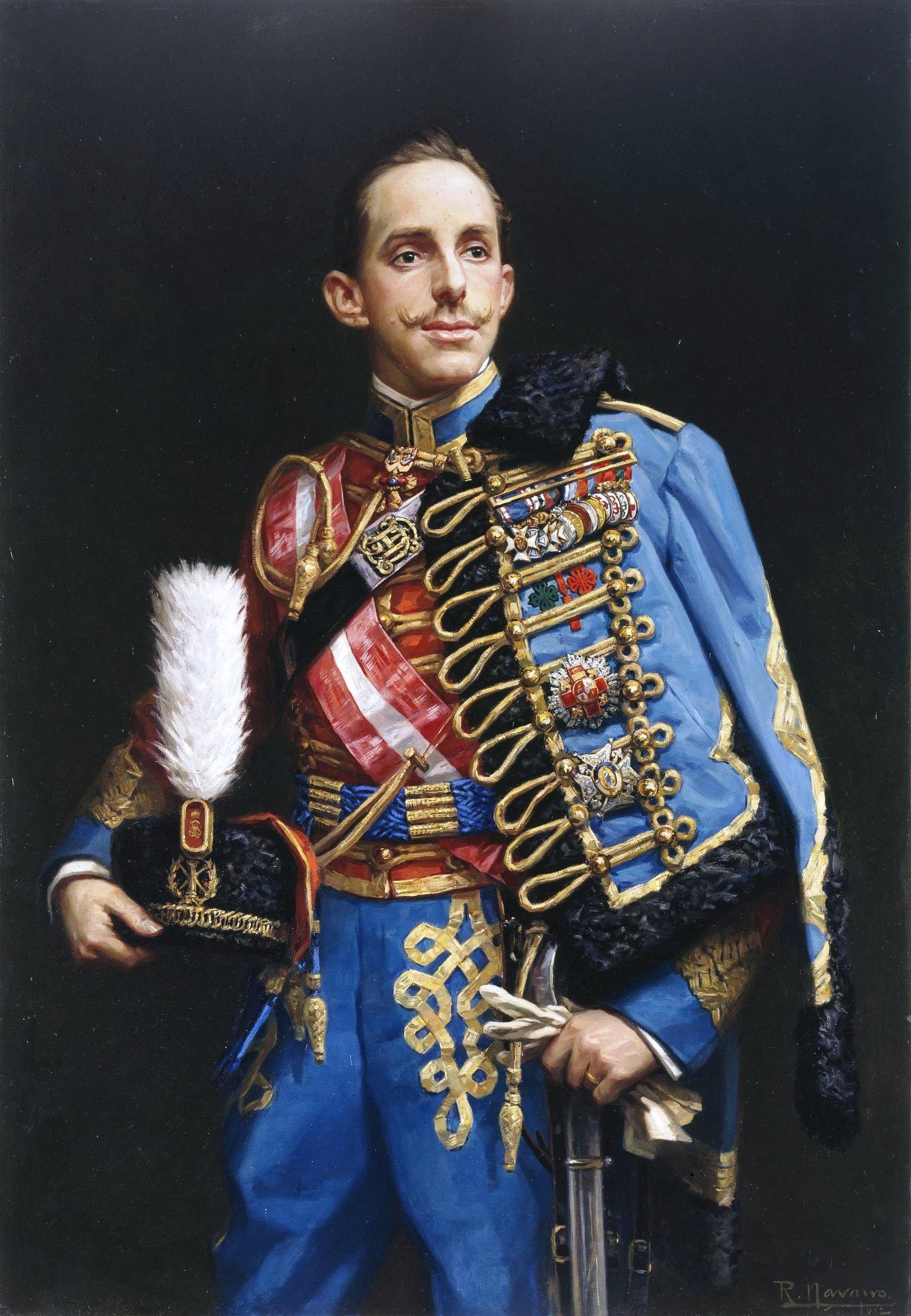 Retrato del rey Alfonso XIII de España (1886-1941), que fue hijo póstumo del rey Alfonso XII de España y de la reina María Cristina de Habsburgo-Lorena. El monarca viste el uniforme de húsar, ostenta la insignia de la Orden del Toisón de Oro y, sobre el dolmán, luce la gran cruz de la Orden de Carlos III, la gran cruz y banda del Mérito Militar con distintivo rojo y las cruces de las cuatro órdenes militares bordadas, así como un pasador con las veneras de las mismas órdenes, entre otras.